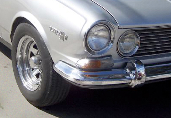 IKA Torino Frnt end